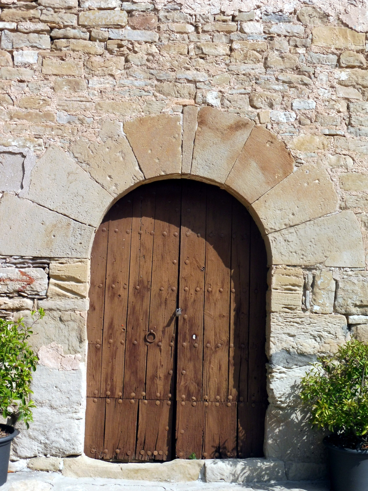 Capella de Sant Pere de Comalats (Copons): portada